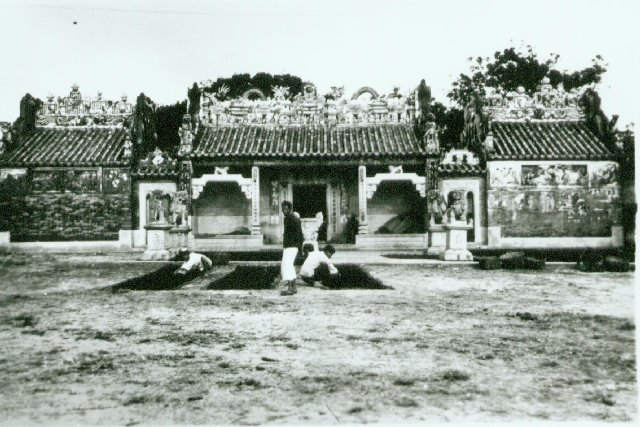 香港長洲北帝廟（玉虛宮）。Pak Tai Temple, Cheung Chau, Hong Kong in 1930.